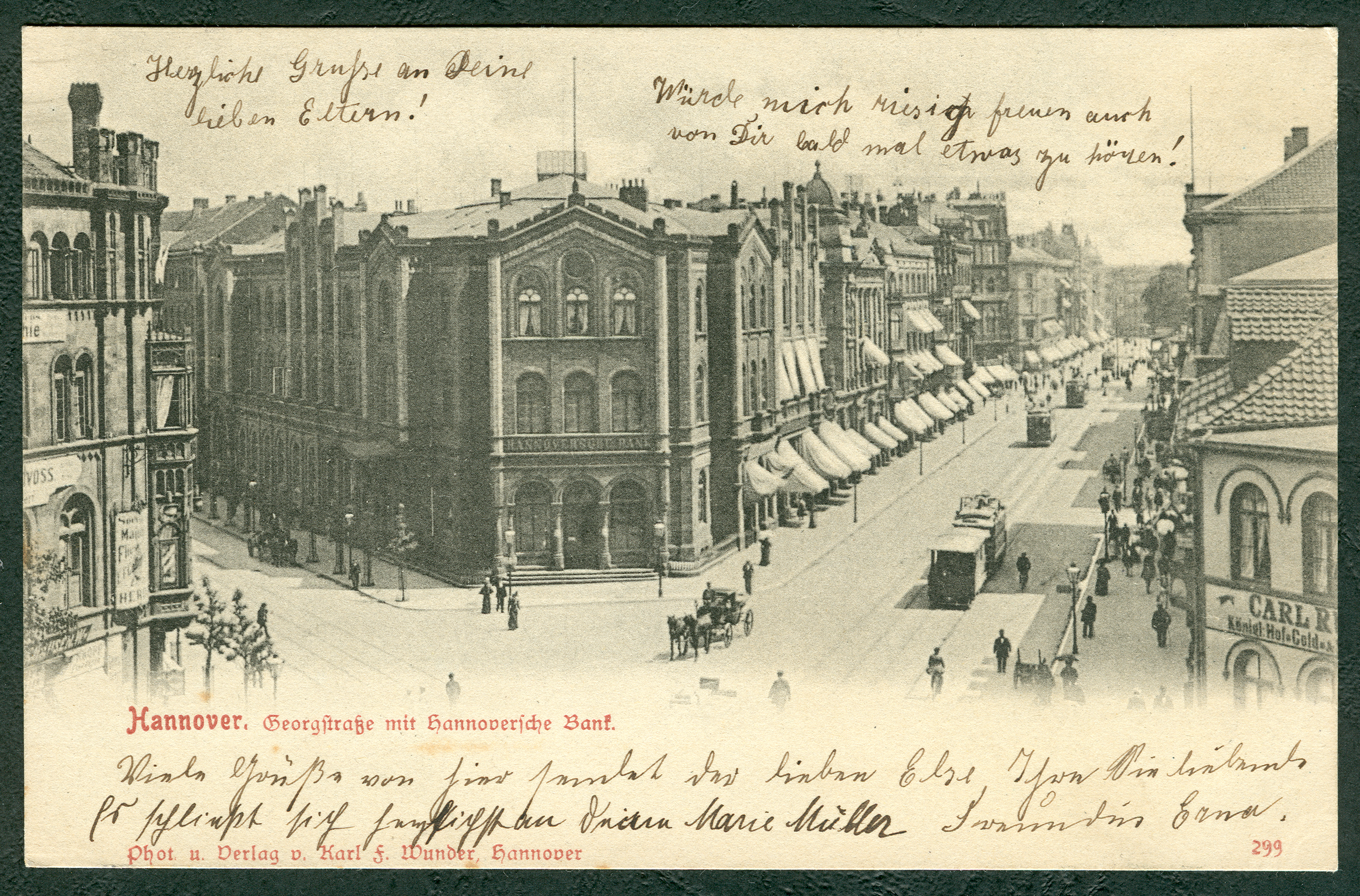 Hannover, Georgstraße / Schillerstraße, Gebäude der Hannoversche Bank AG, Ansichtskarte Nr. 299 von Karl Friedrich Wunder